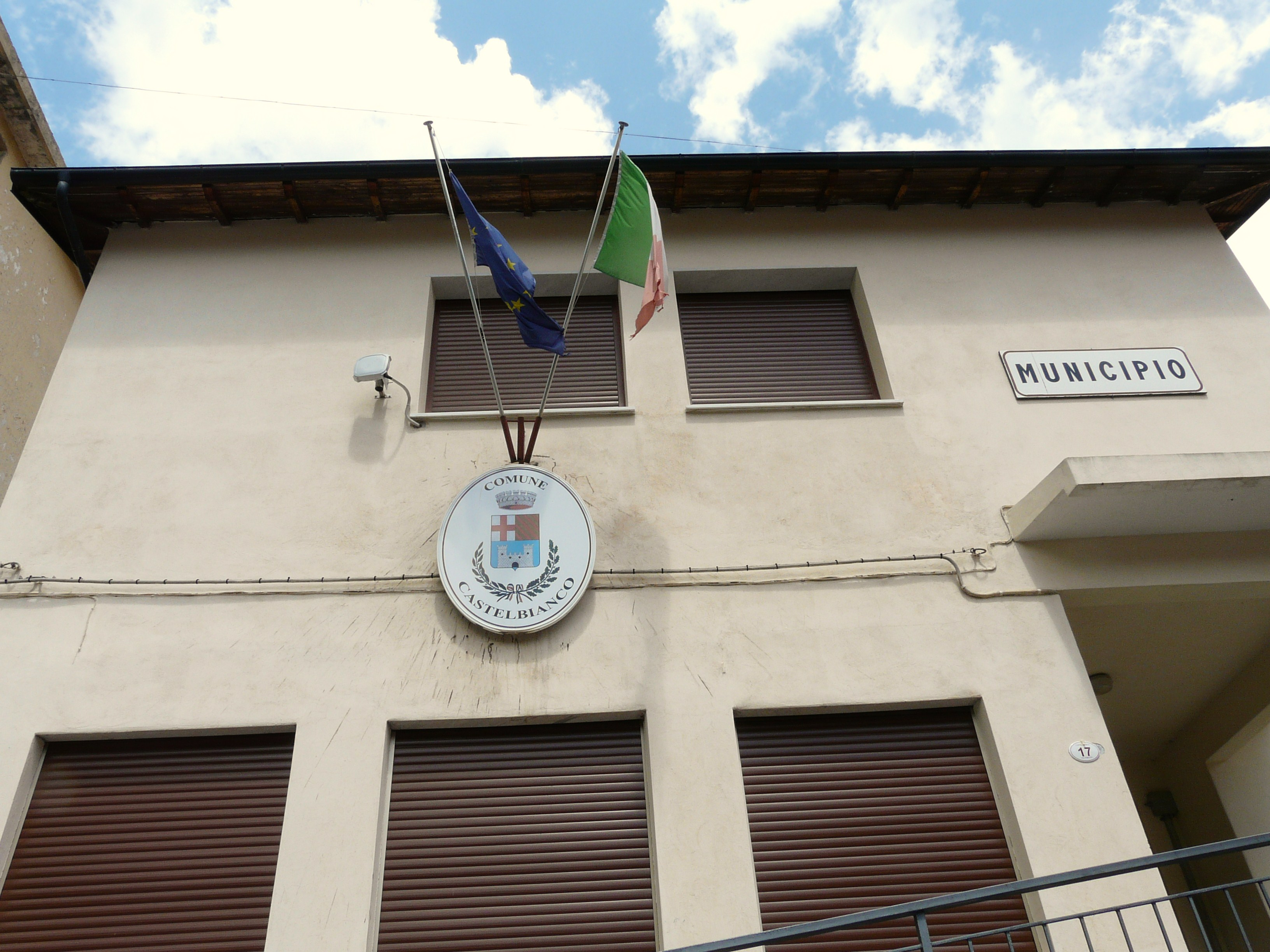 Comune di Castelbianco, Liguria, Italia